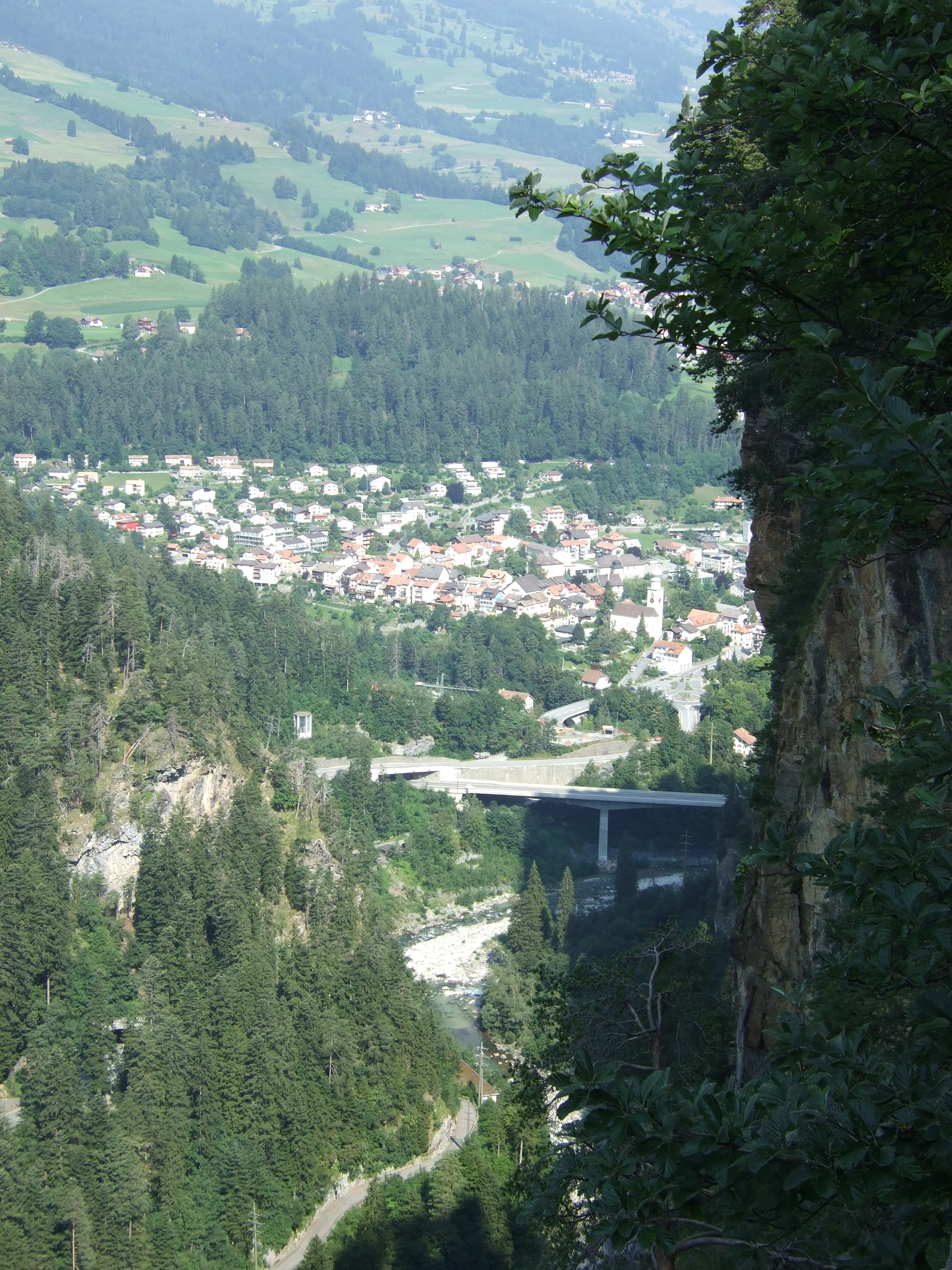 Blick auf Thusis aus der Via Mala